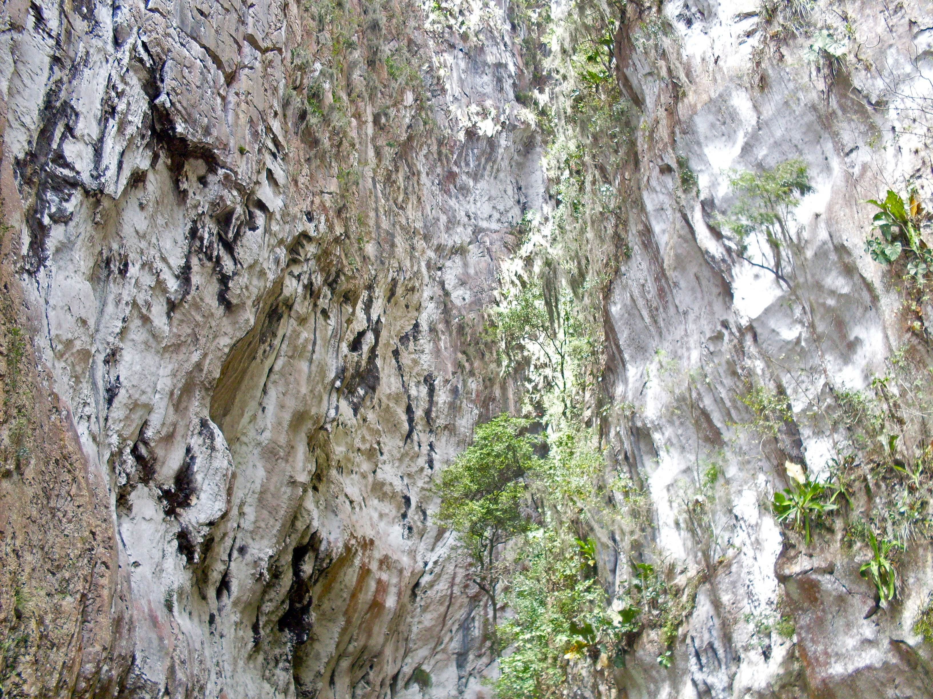 Las Puertas de Miraflores, Monagas. Parque Nacional El guacharo.